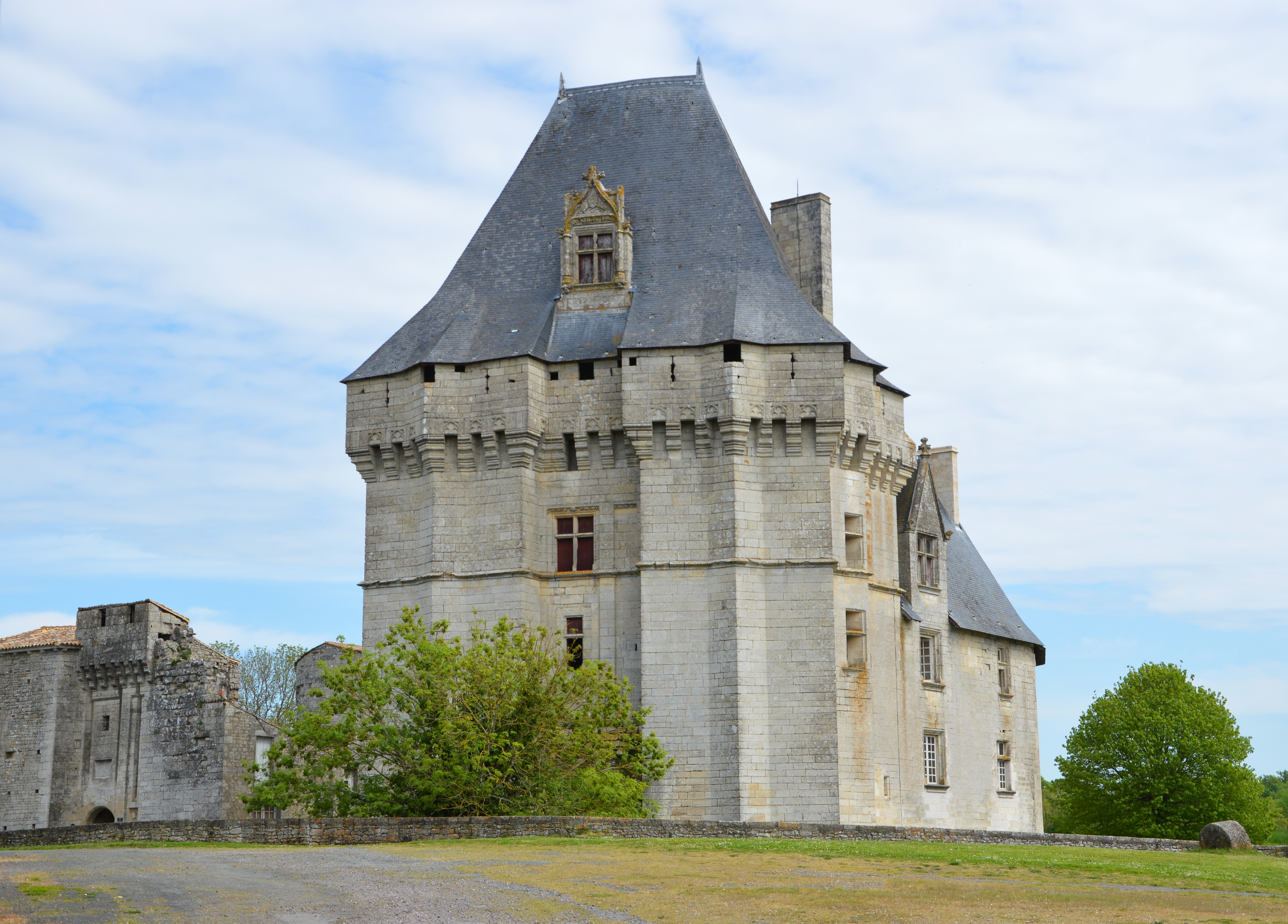 Château de Cherveux .